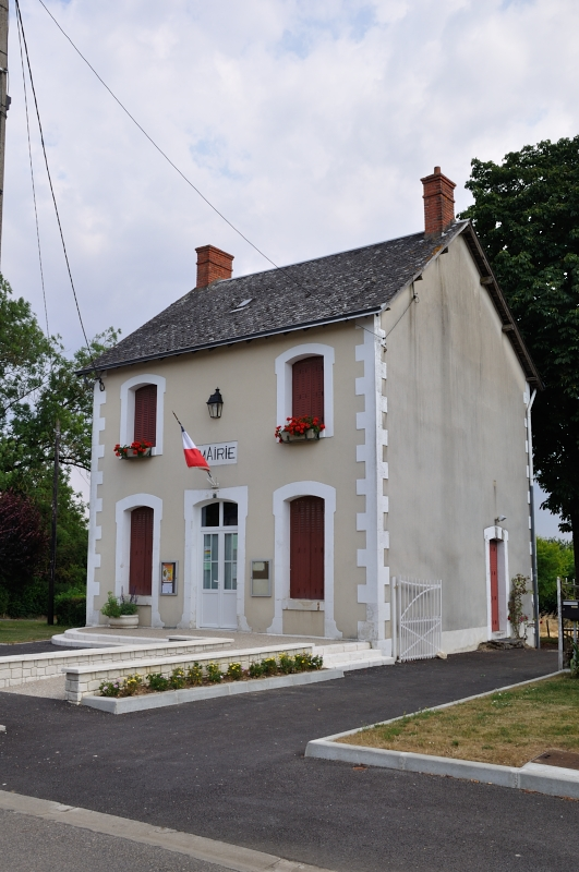 Saint-Lactencin (Indre) - Mairie